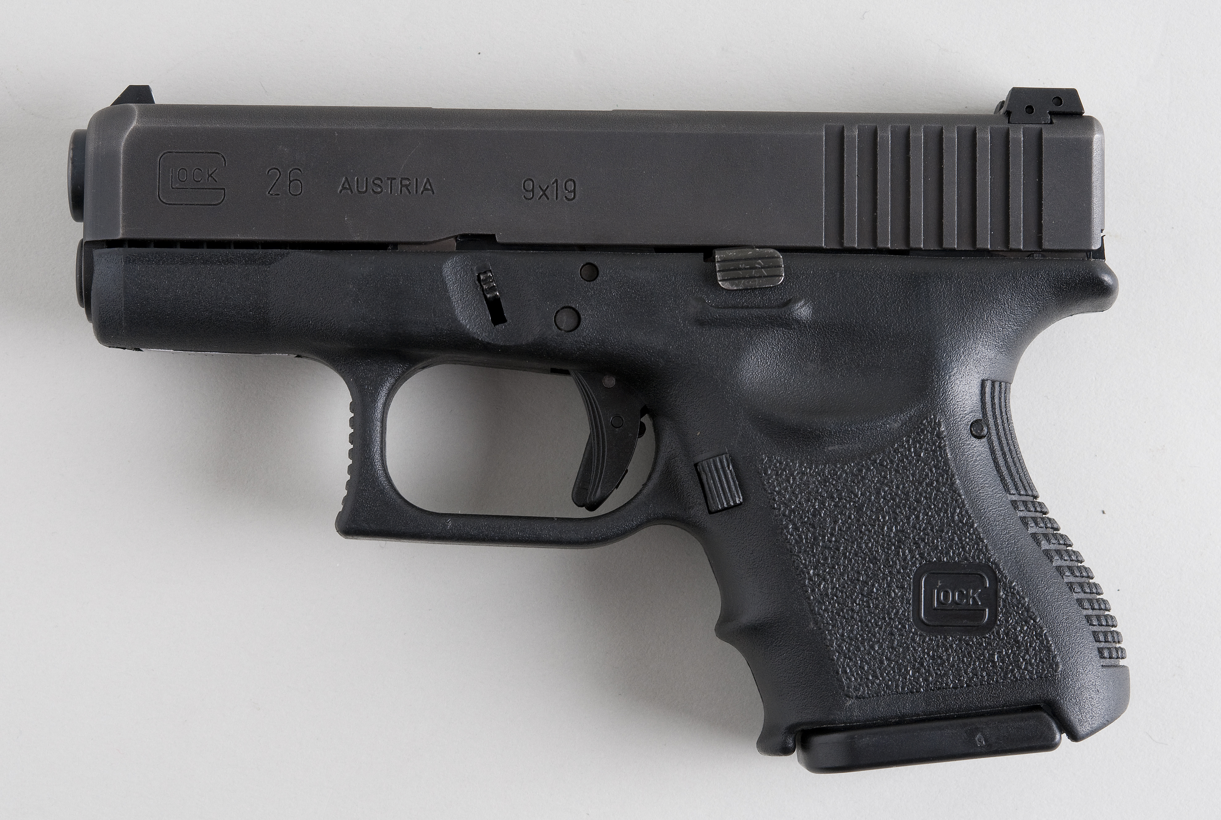 Glock 26 From flickr user handvapensamlingen - Pistols used in Norway.